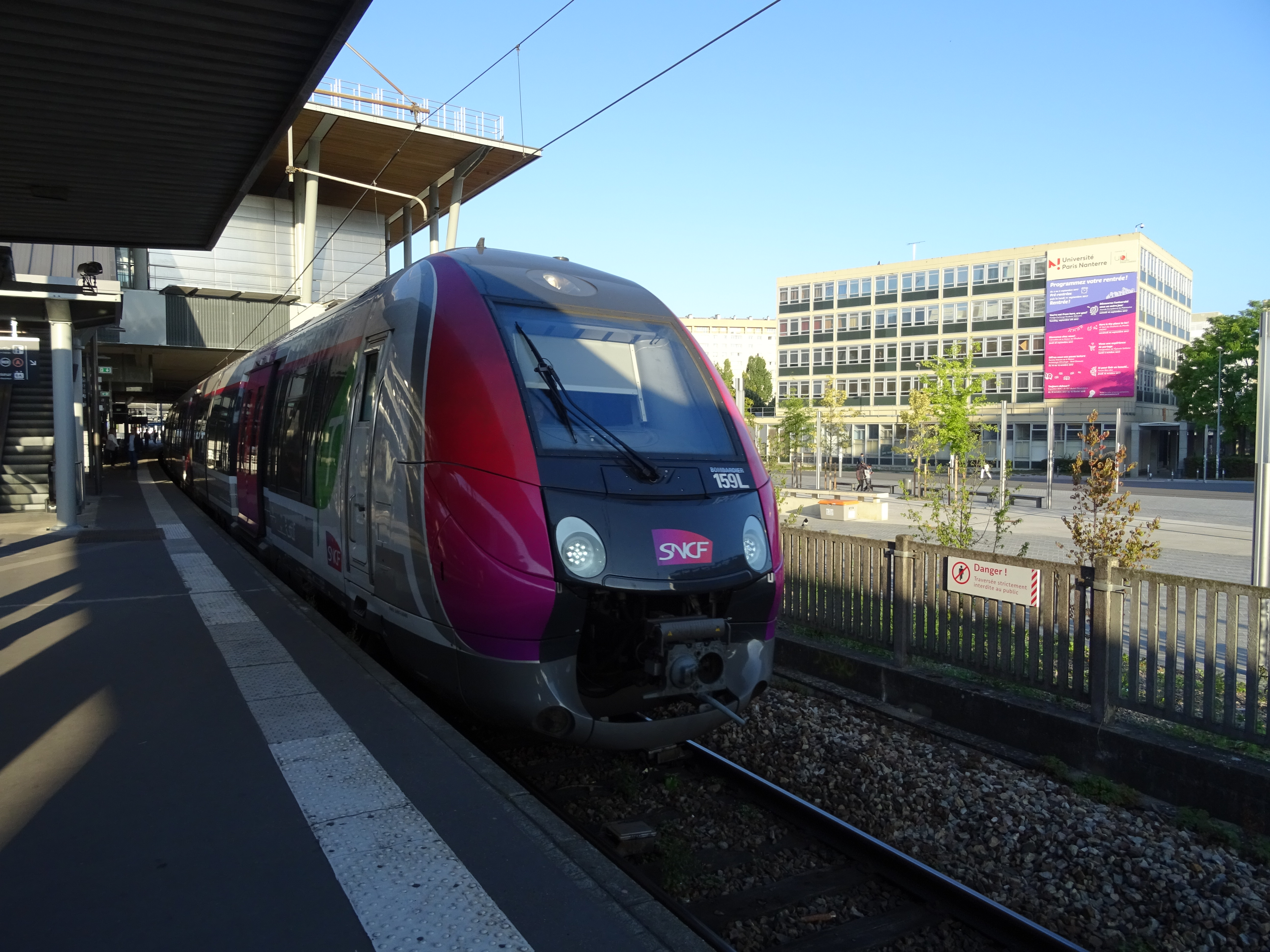 Francilien à quai à Nanterre-Université